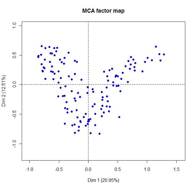 ACM contribution des individus aux deux premiers axes, d'après une étude sur la perception des ogm menée par Agrocampus Université de Rennes auprès de 135 personnes en 2008